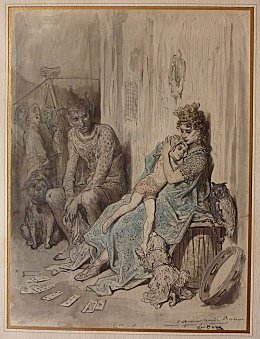 Dessin de Gustave Doré reproduisant son tableau Les Saltimbanques, offert à Amédée Béesau en remerciement d'un poème qu'il avait écrit en s'inspirant dudit tableau en 1876.